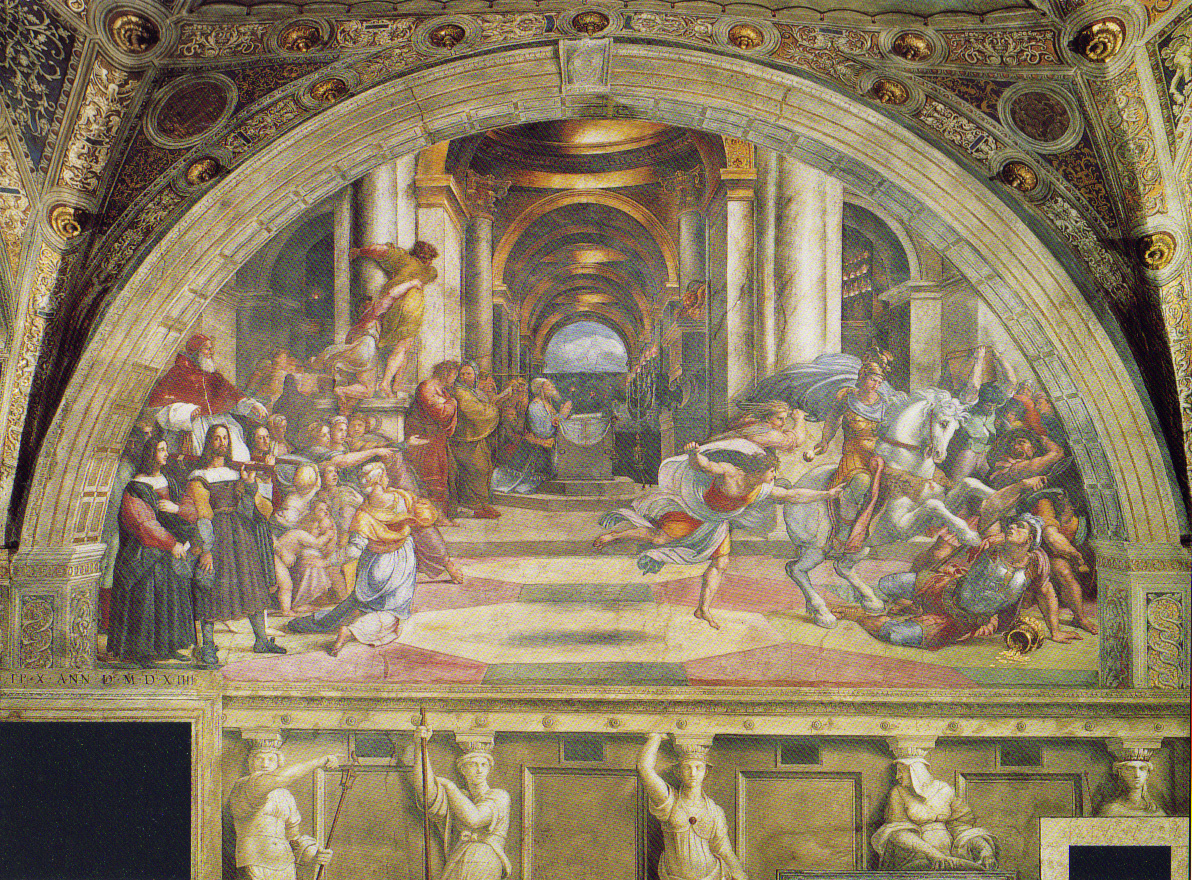 Raffaels Vertreibung des Heliodor in den Stanzen des Vatikan, 1511, Vatikan, Vatikanspalast